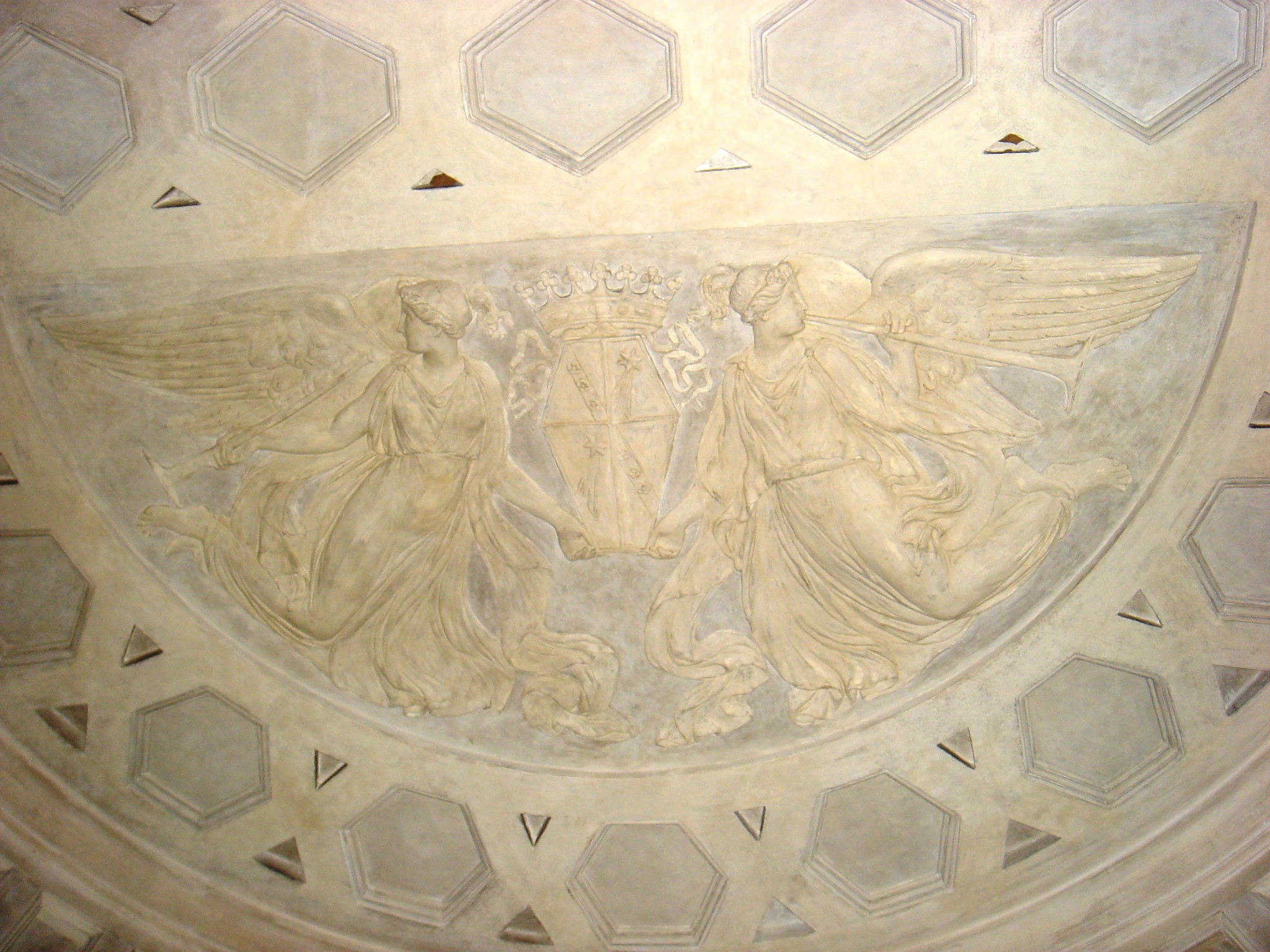 Roma, Villa Torlonia: decorazione neoclassica con stemma dei Torlonia.